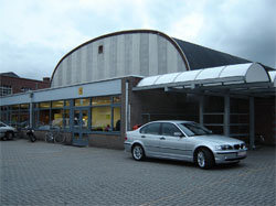 Sporthal van THHI, oftewel het Technisch Heilig-Hartinstituut te Tessenderlo, België.